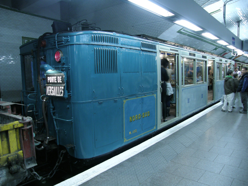 Motrices Sprague-Thomson de la ligne Nord-Sud du métro parisien. Elles se distinguaient par leur persiennes et par la peinture de la caisse en bleu, le bleu étant plus foncé au niveau de la loge.